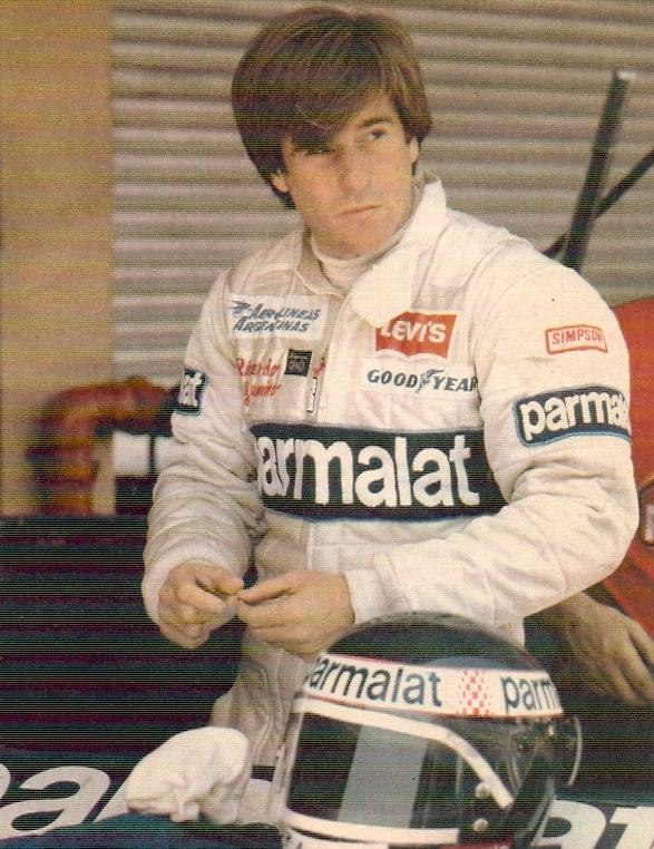 Ricardo Zunino en el Gran Premio de Argentina de 1980, Autódromo de Buenos Aires.